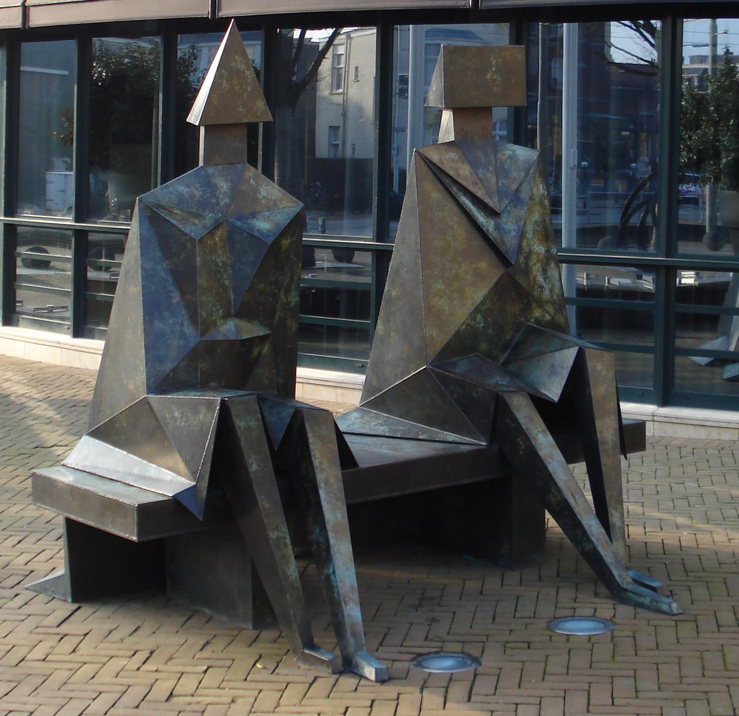 Scheveningen Circusplein. Sitting Couple by Lynn Chadwick. The Hague/The Netherlands.